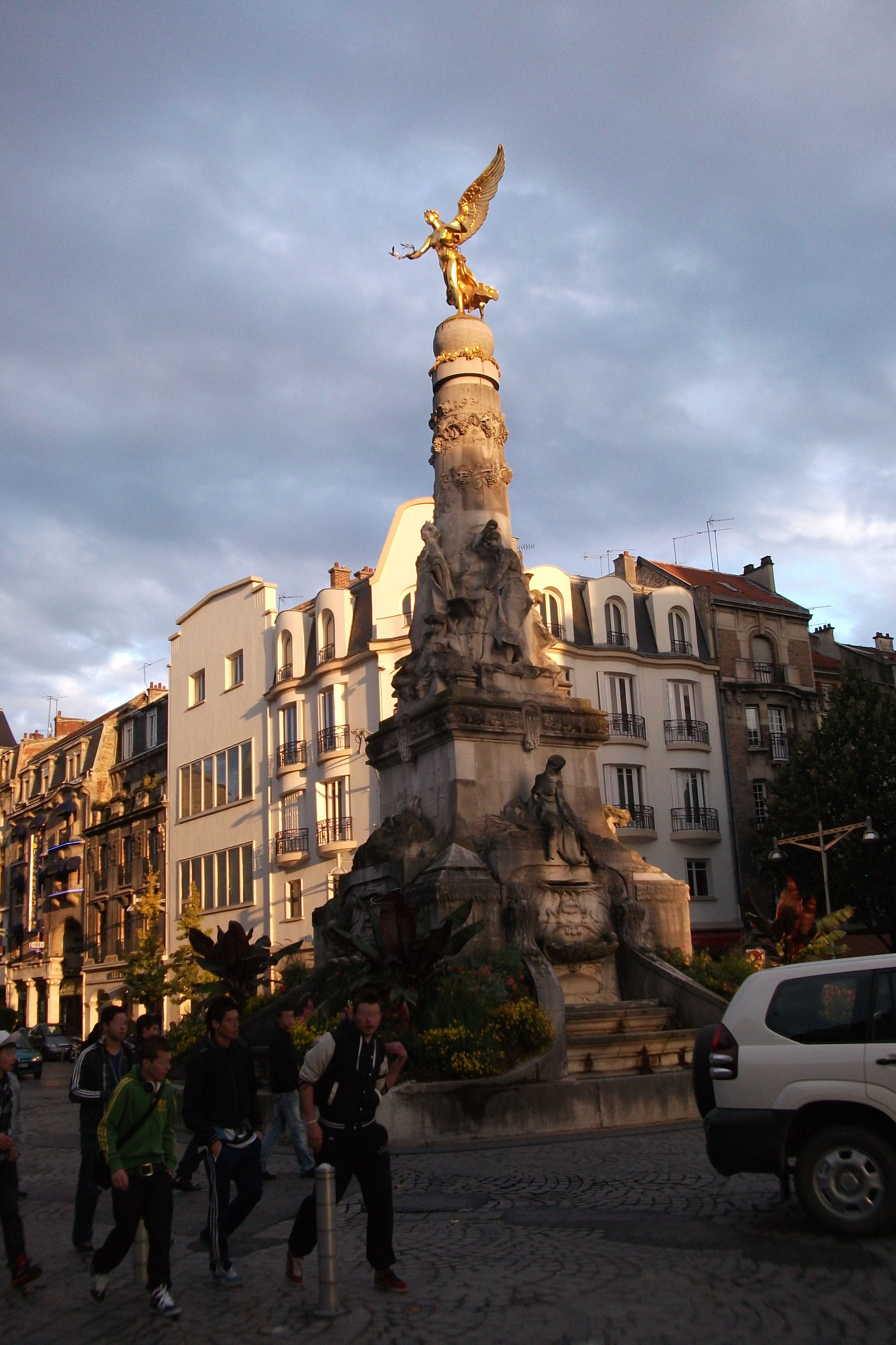 la Fontaine Subé de Reims vue depuis le nord ouest.